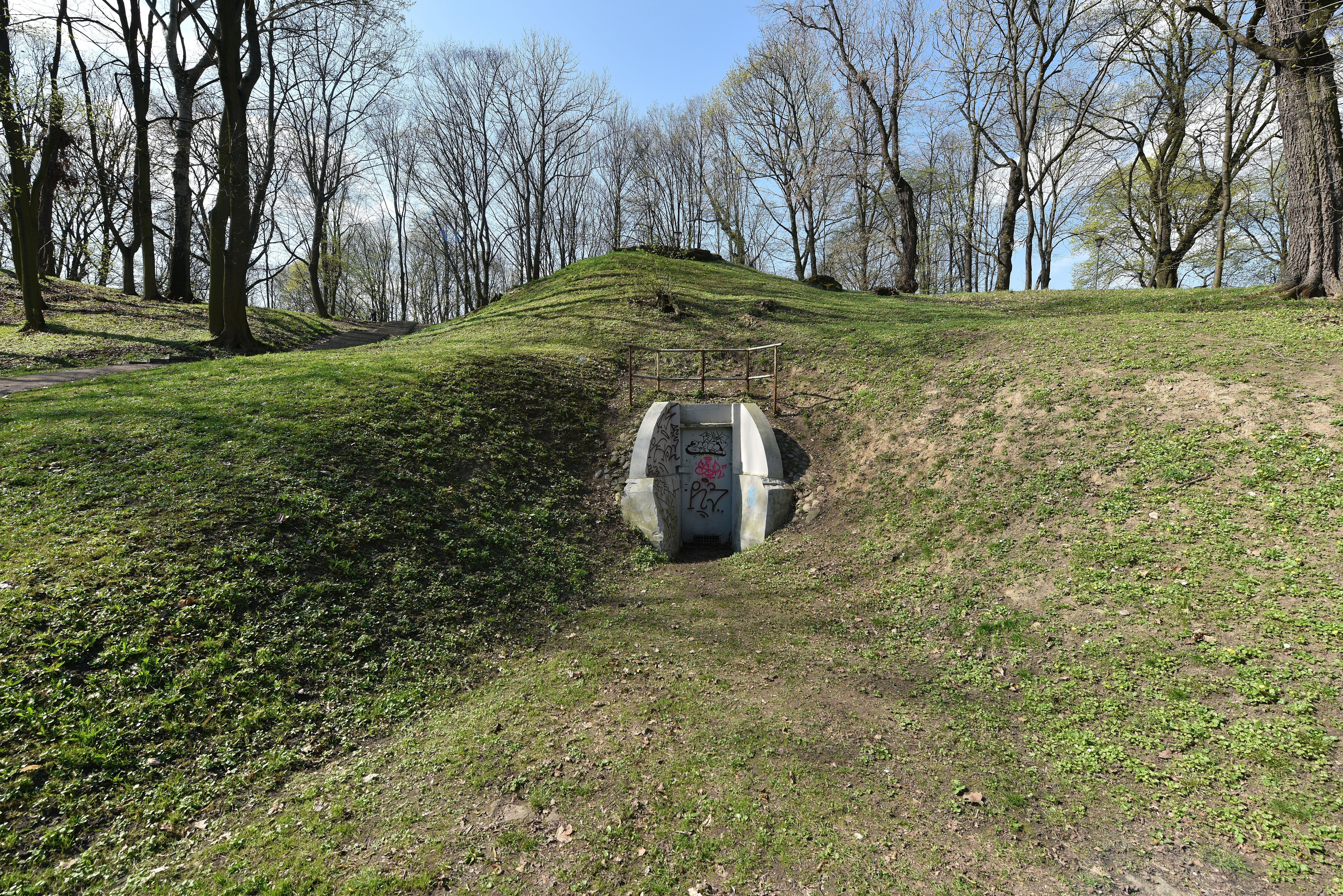 Park na Książęcem w Warszawie. Wejście do elizeum